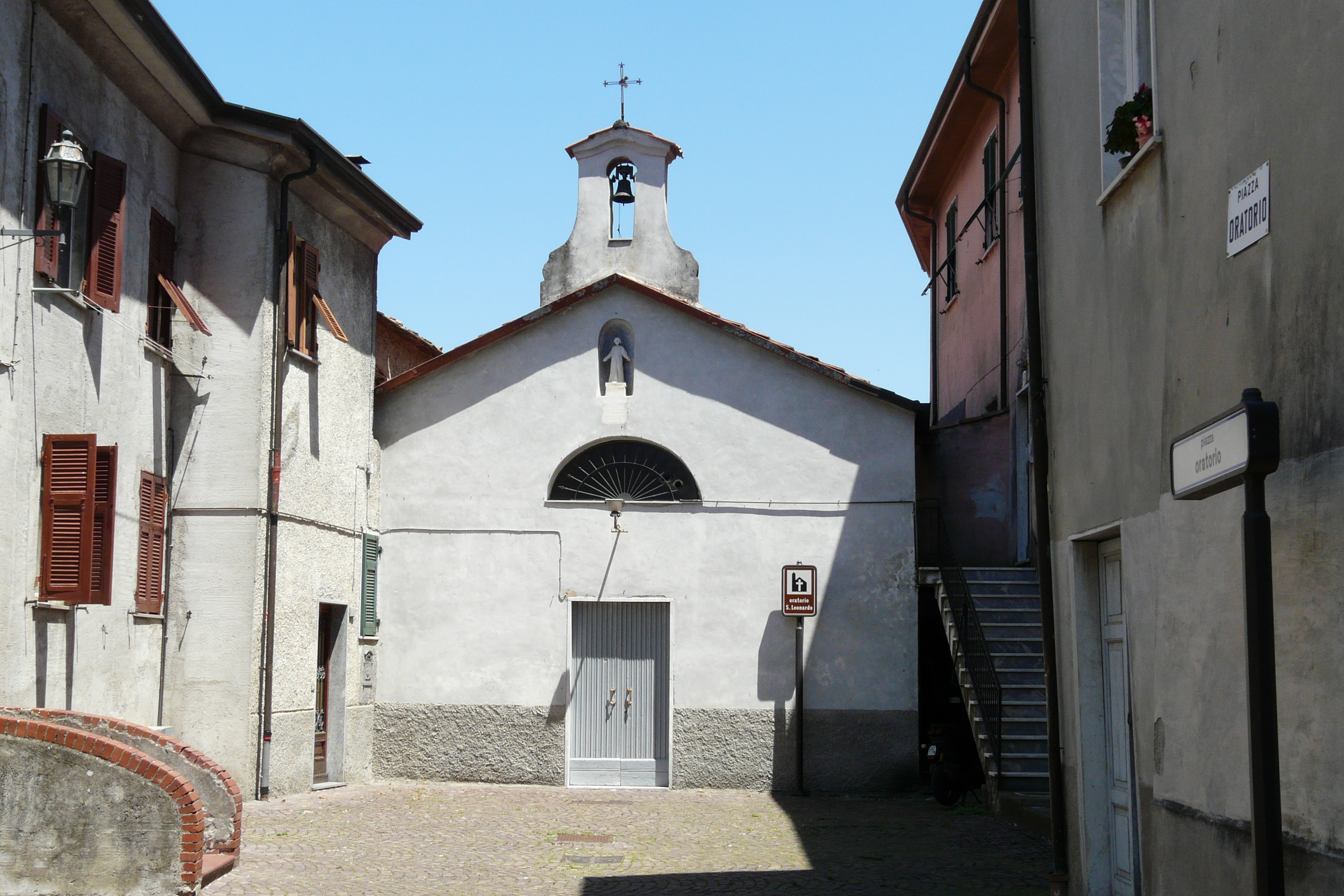 Oratorio di San Leonardo, Santo Stefano di Magra, Liguria, Italia